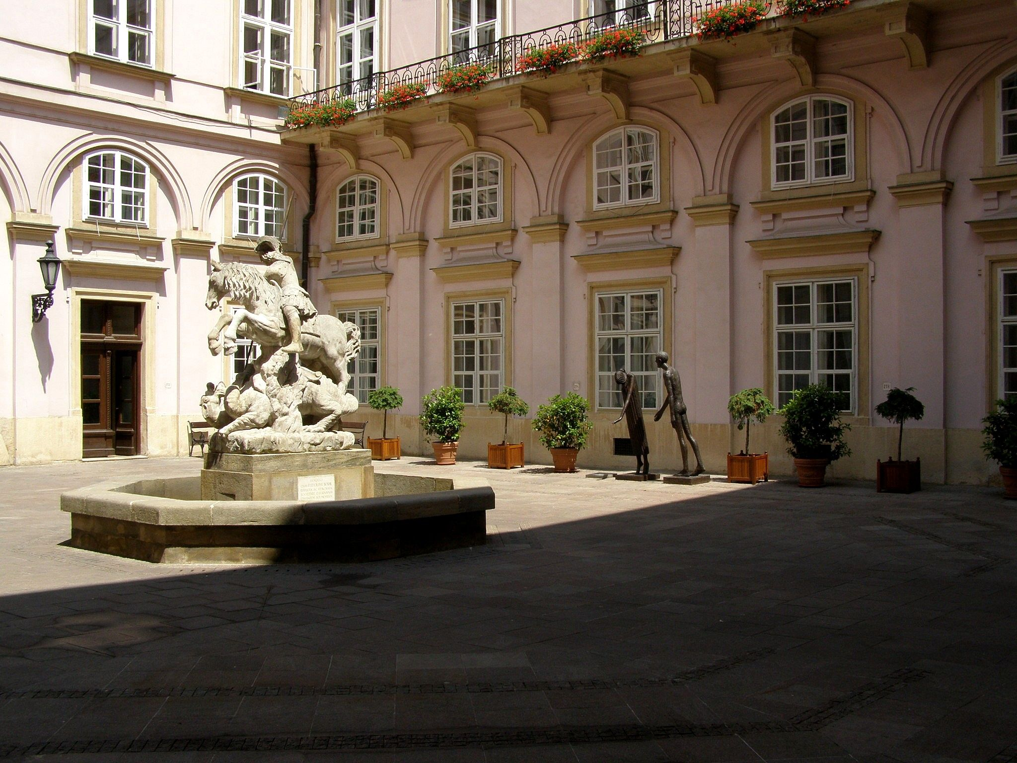 Prvé nádvorie paláca